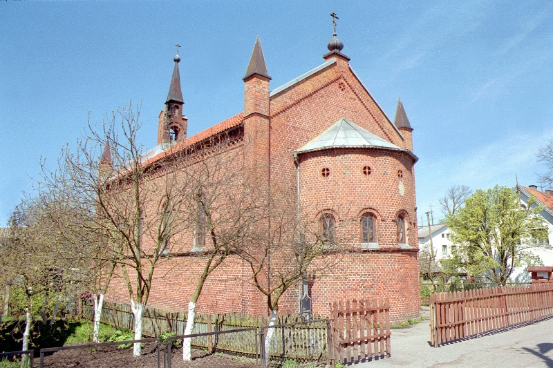 Храм преподобного Сергия Радонежского в поселке Рыбачий